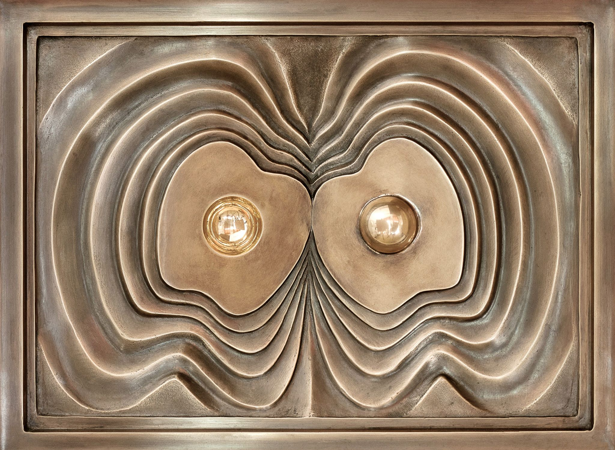 Misztérium